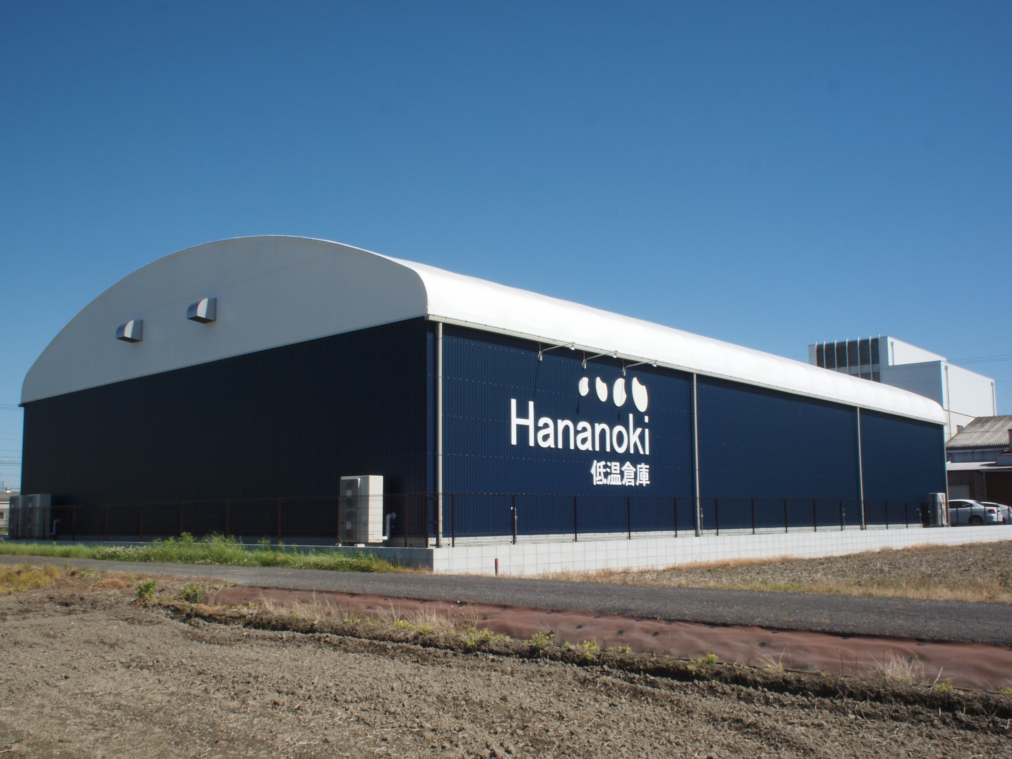 ハナノキ本社北倉庫（2018年5月）